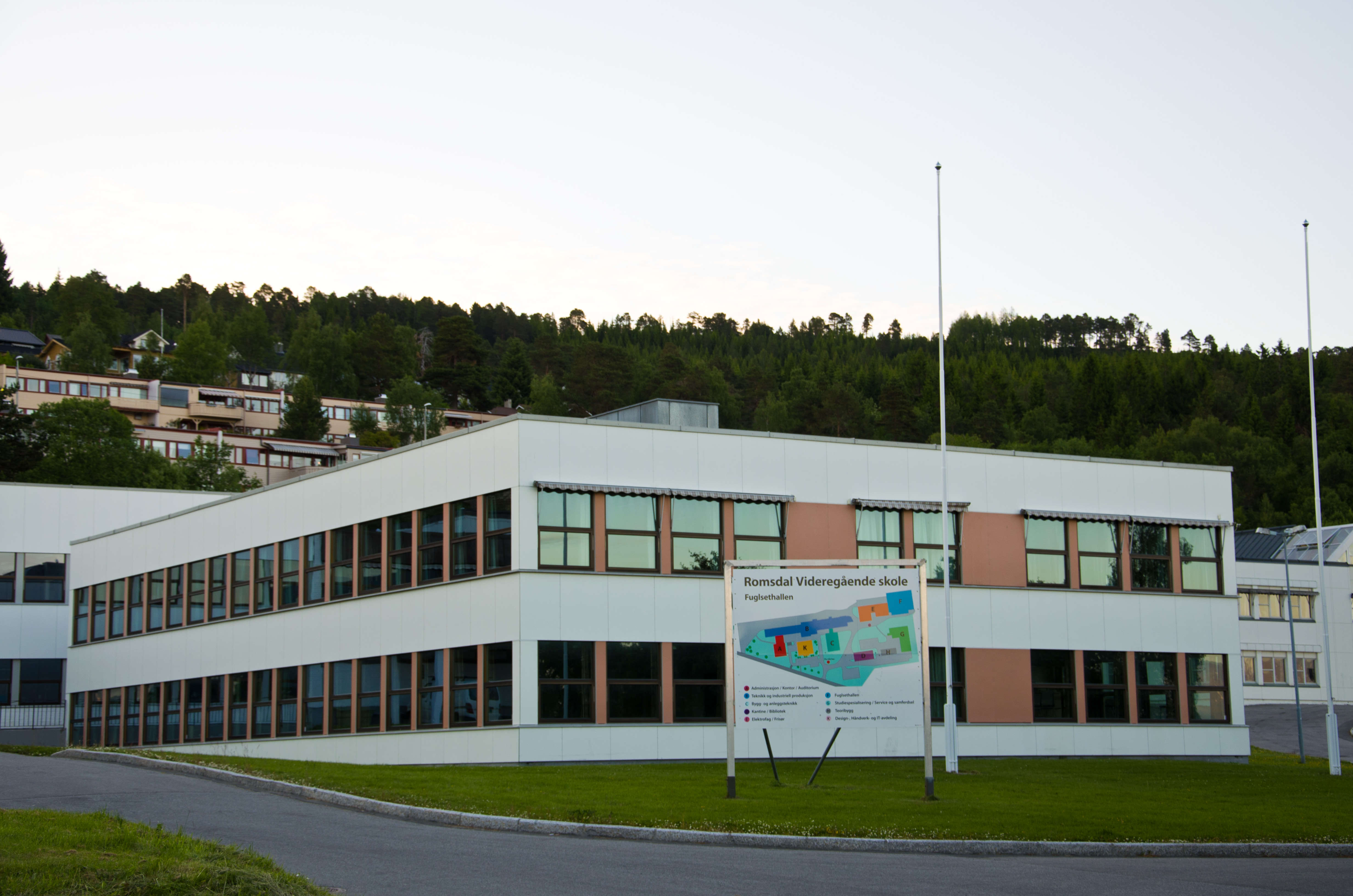 Romsdal videregående i Molde kommune.